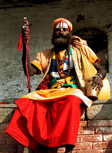 © Leonardo C. Fleck